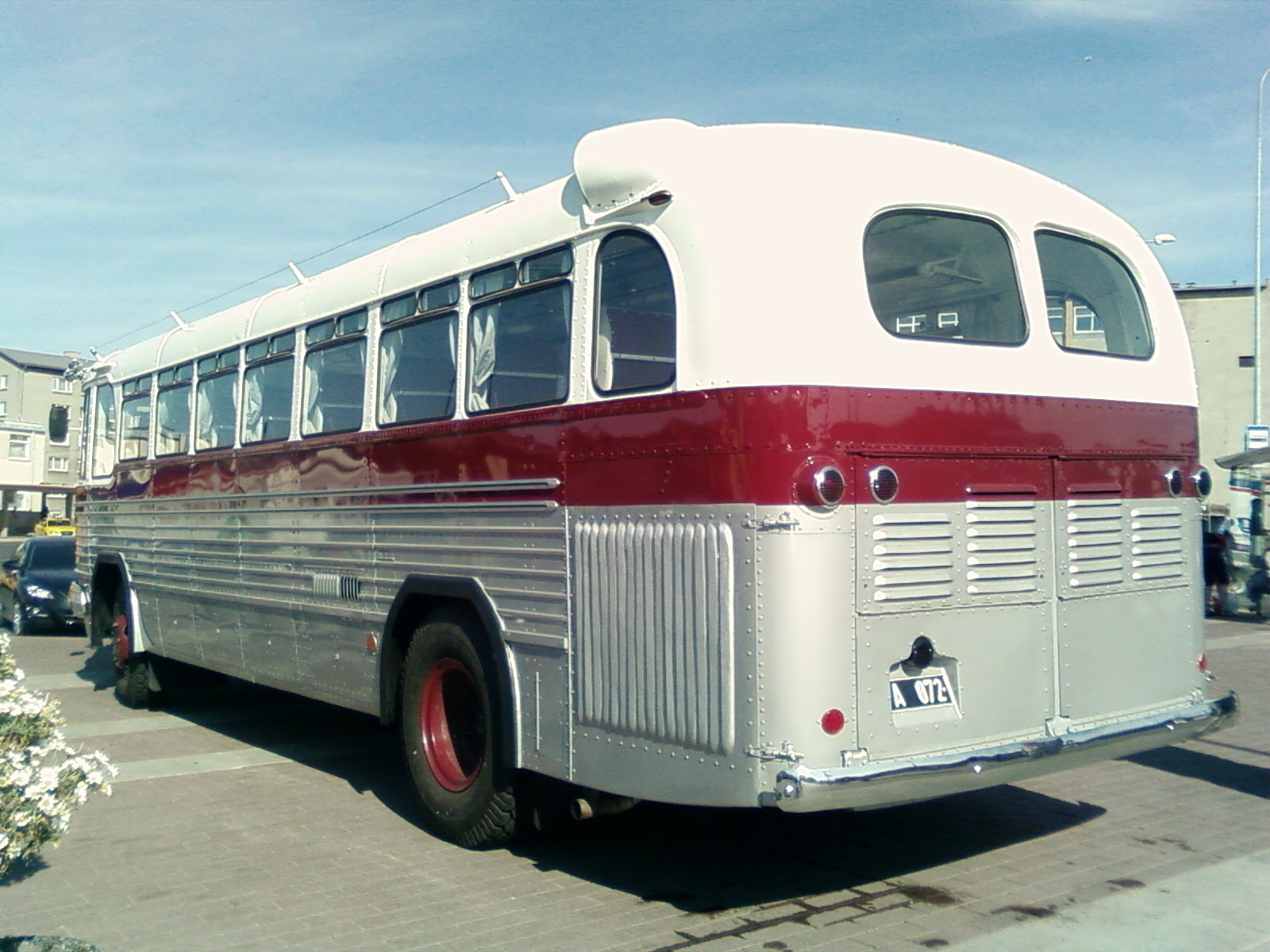 ZiS-127 Tallinna autobussijaamas